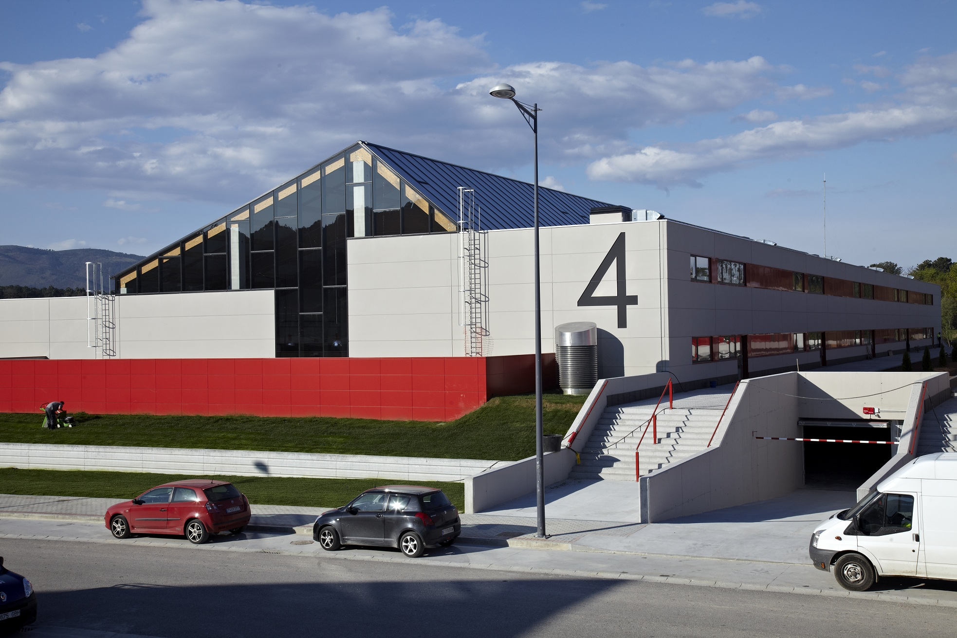 Naves industriales bioclimáticas del parque empresarial Porto do Molle en Nigrán, Vigo